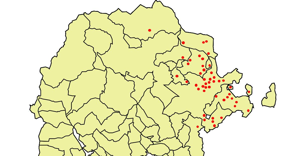 Distribución de monumentos románicos en el norte de Palencia (España)